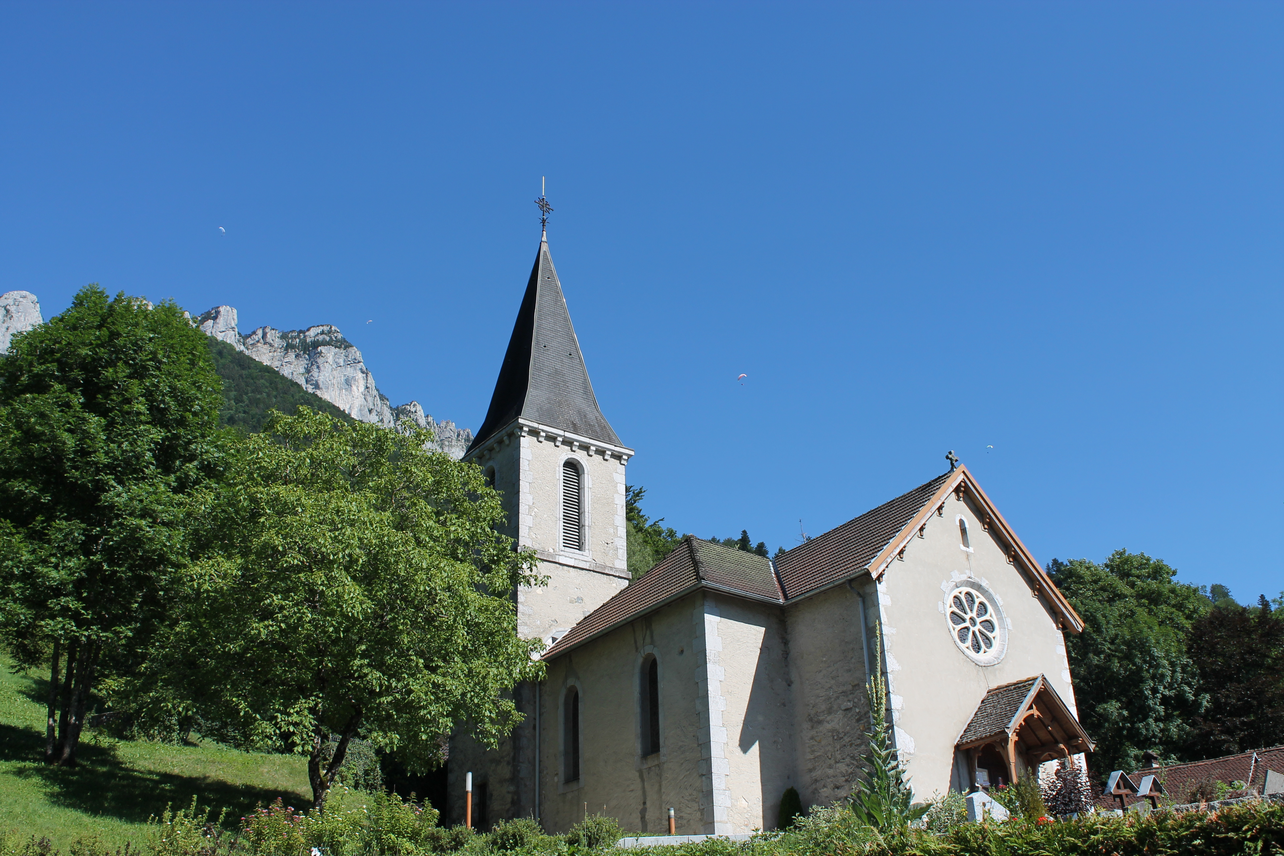 Église Saint-Pierre et Saint-Paul de Bluffy (XIXe siècle)